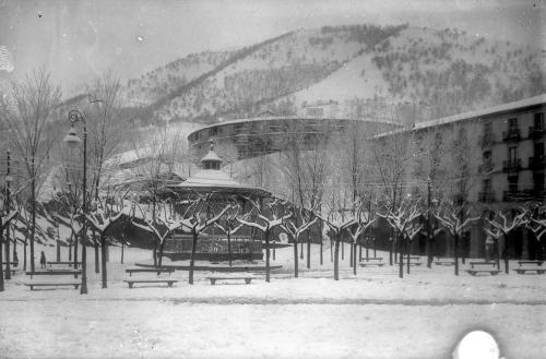 Eibar. Plaza de Unzaga y la Plaza de Toros antes de la guerra. Fotografía de 1937